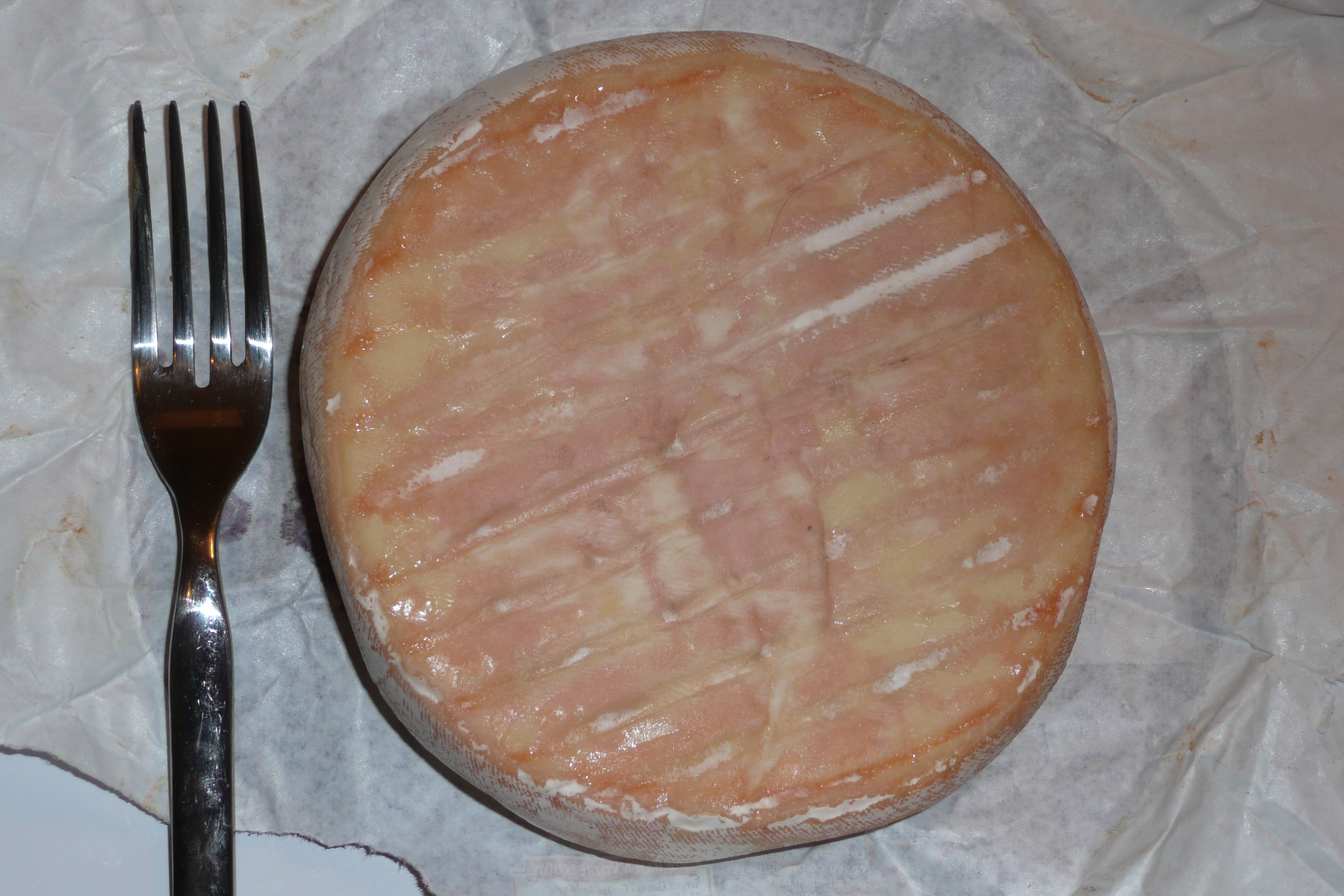 Saint Nectaire de 600 grammes